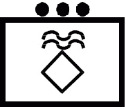 Das Taktische Zeichen des Wasserrettungszugs